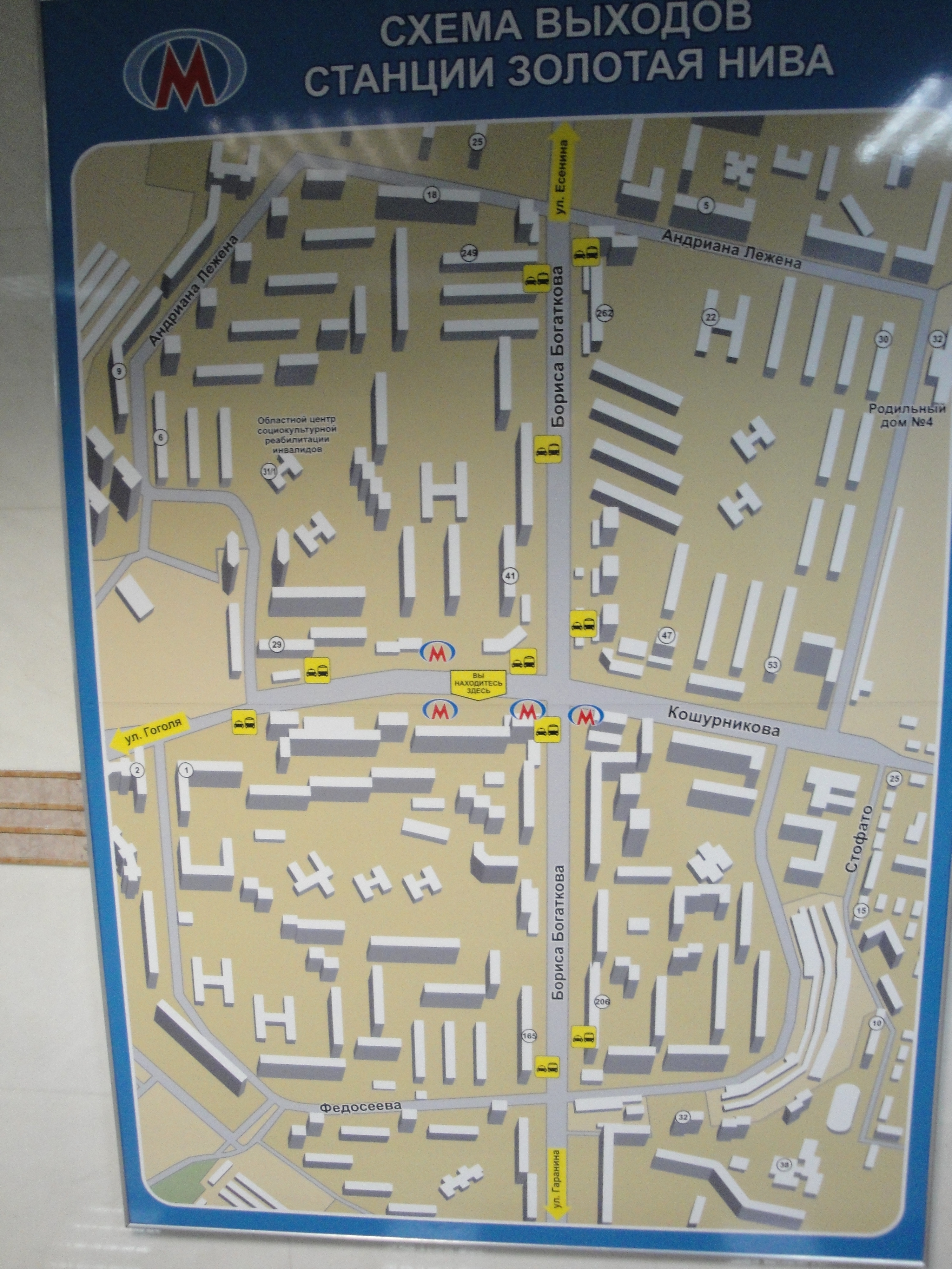 Станция метро «Золотая Нива». Карта со схемой выходов.